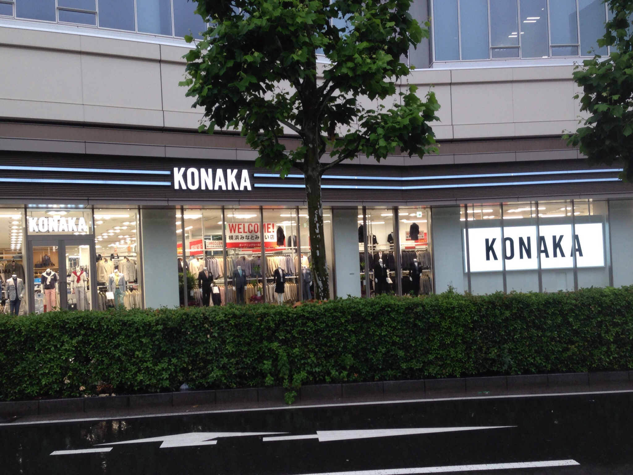 横浜アイマークプレイスのテナント、KONAKA（紳士服のコナカ）。